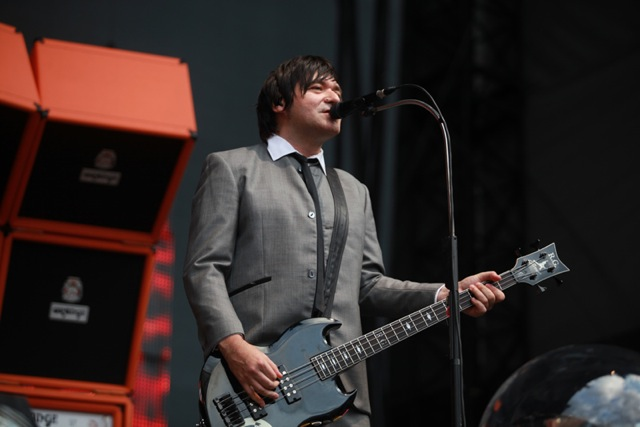 Rodrigo González, Bassist der Band Die Ärzte, am 15. Juni 2013 im Kölner RheinEnergieStadion.